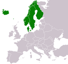 Noruega, Suecia, Finlandia y Dinamarca